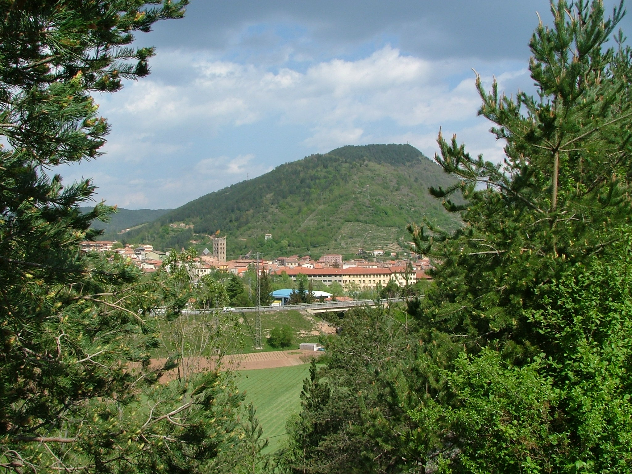 Ripoll, Catalunya, Espanya.